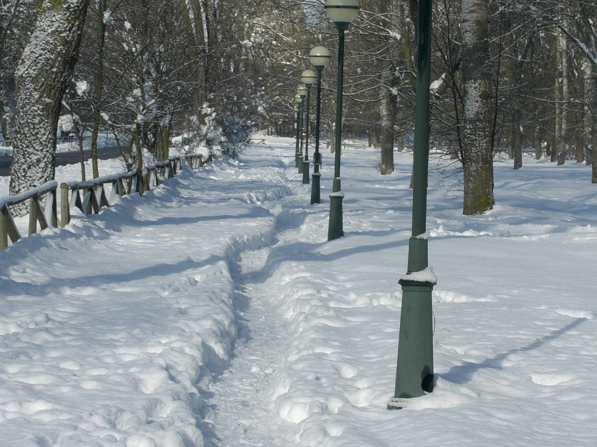 Parque de Fuentes Blancas, Burgos, España.